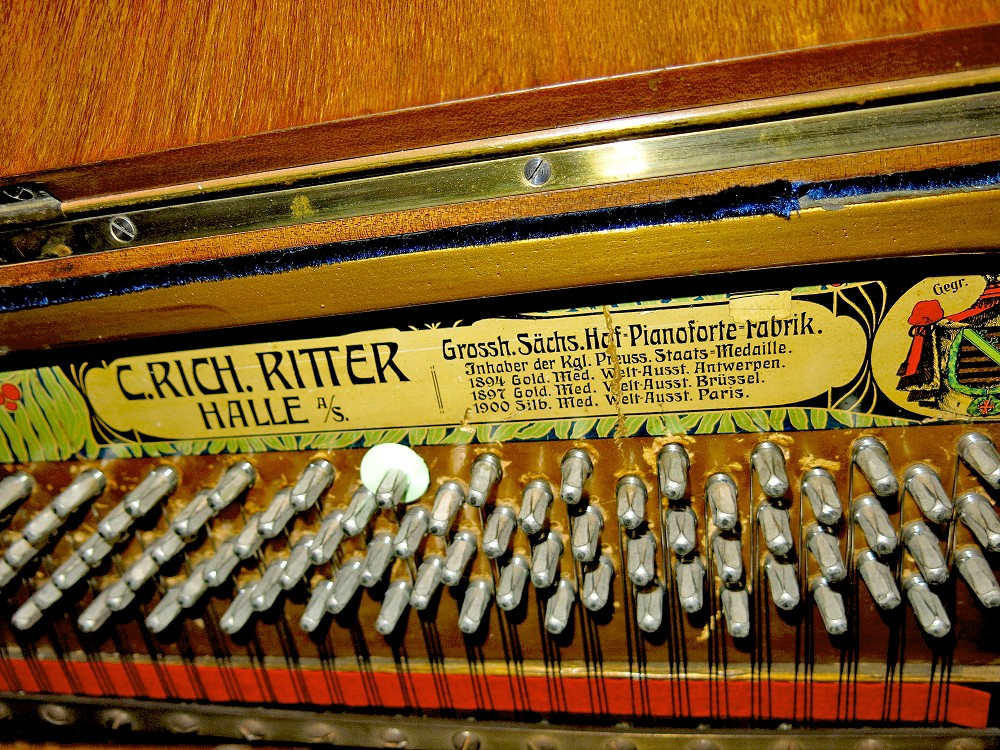 Typische Inschrift der Ritter Klaviere der Jahrhundertwende. Um 1900 in der Grossh. Sächs. Hof Pianoforte Fabrik.